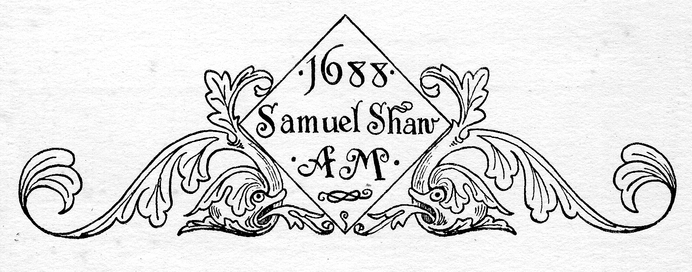 Samuel Shaw tablet 1688